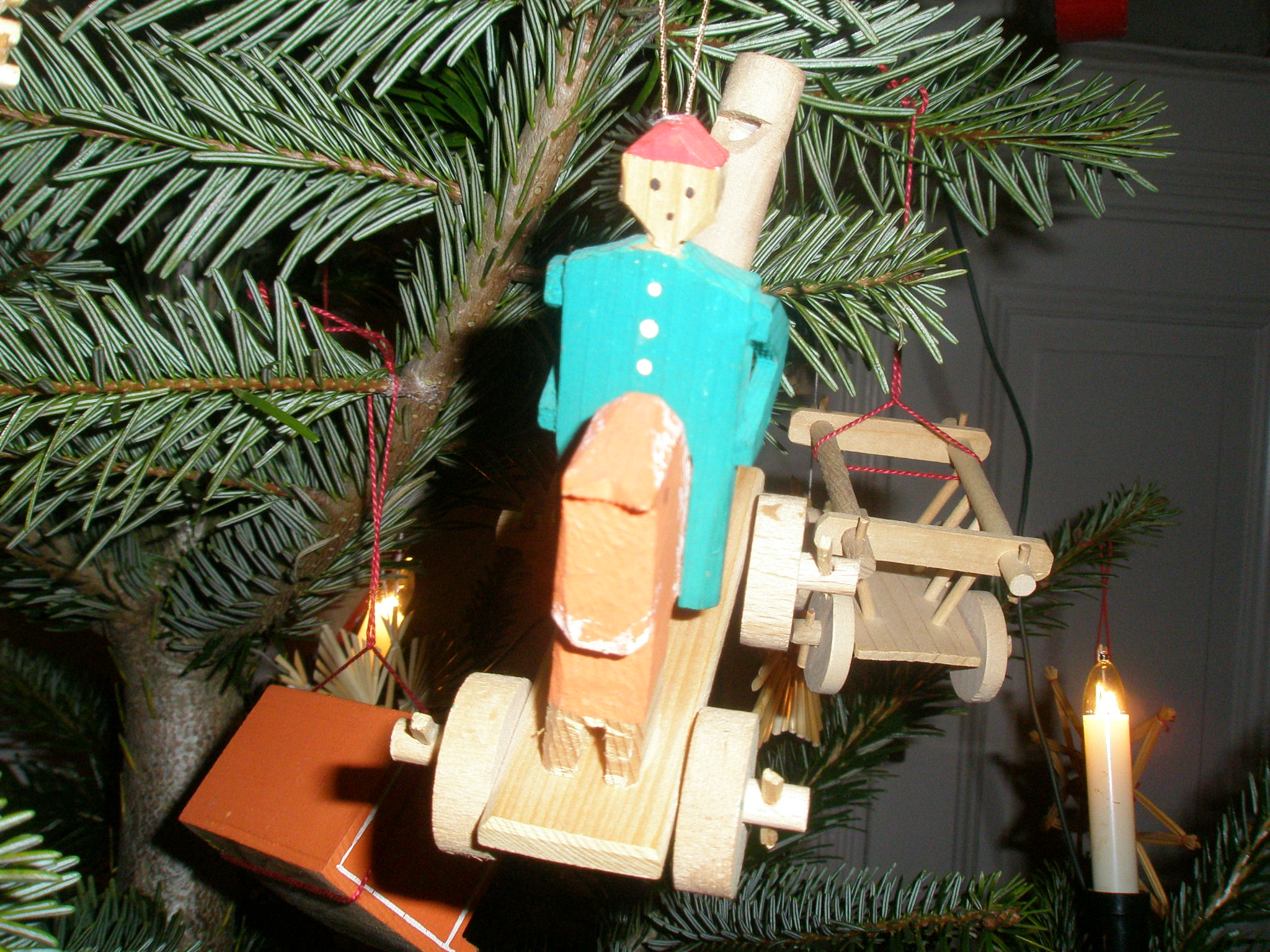 Am Christbaum: Arschpfeifenrössl von vorne